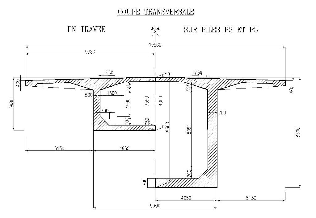 Viaduc de la Barricade - Coupes transversales du tablier, sur appui et à mi-travée